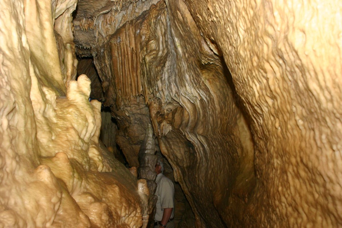 Binghöhle bei Streitberg